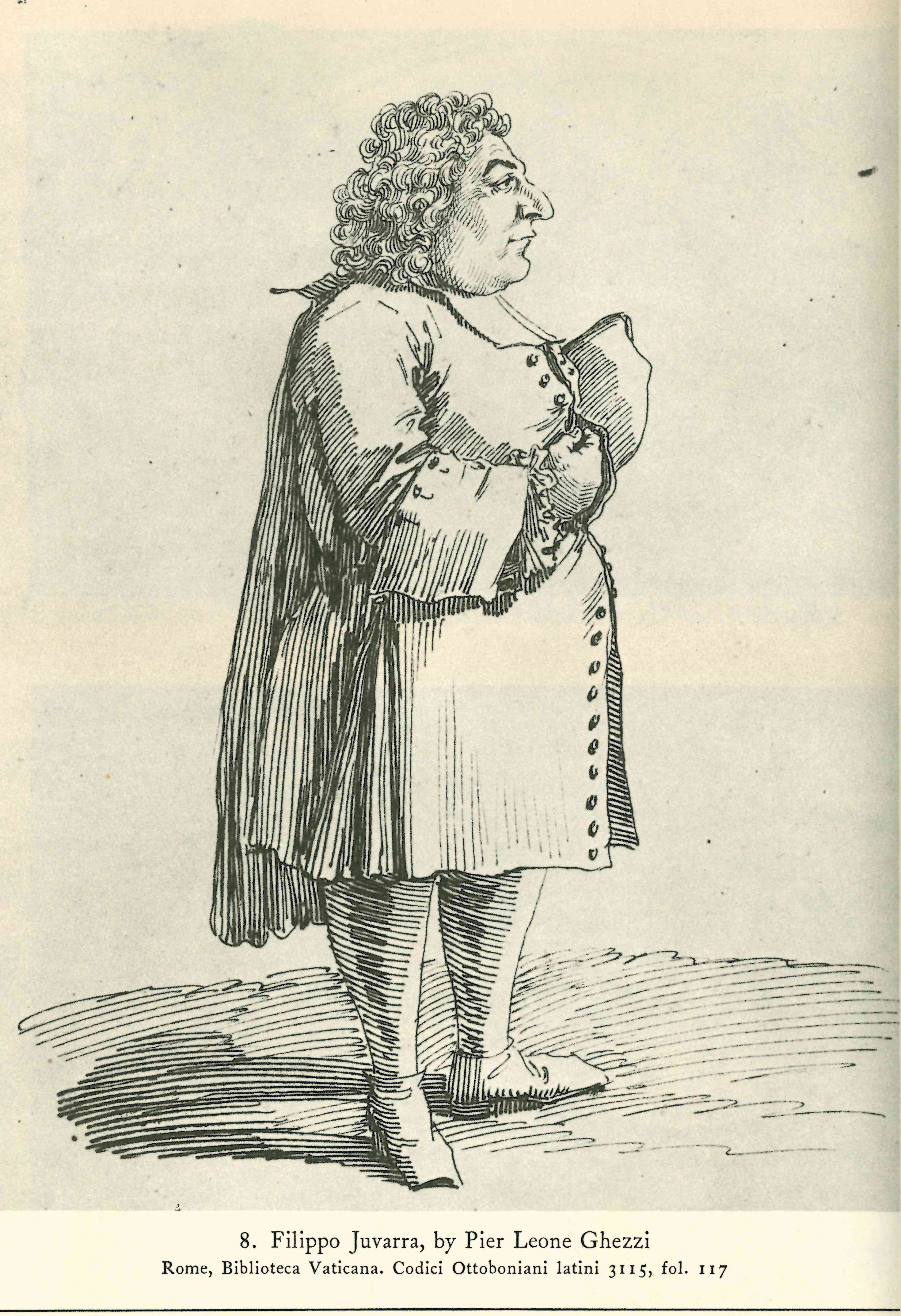 Filippo Juvarra (1678–1736), italienischer Architekt Karikatur von Pier Leone Ghezzi (1674–1755)